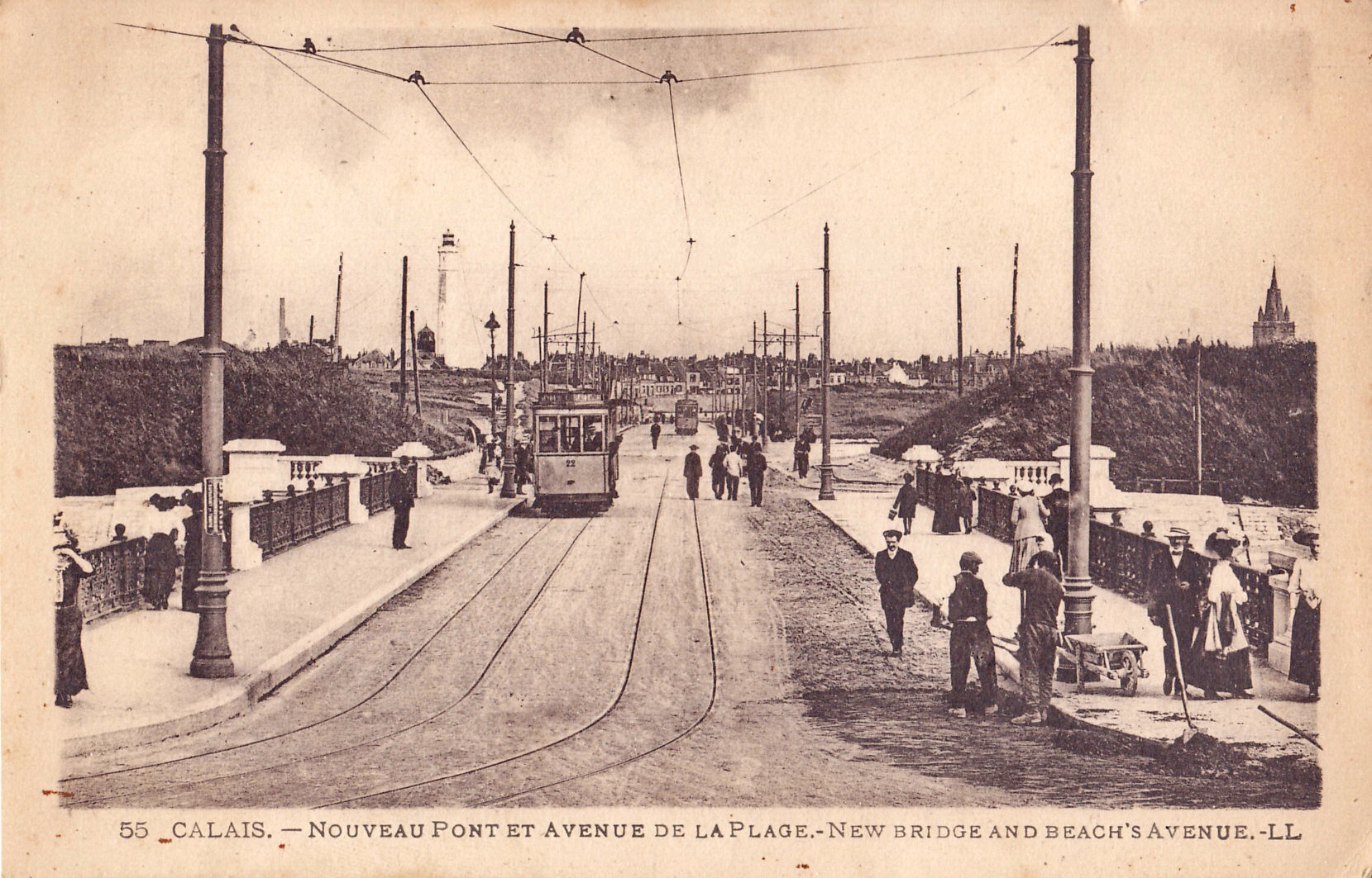 Carte postale ancienne éditée par LL, n°55 : CALAIS - Nouveau pont et Avenue de la Plage